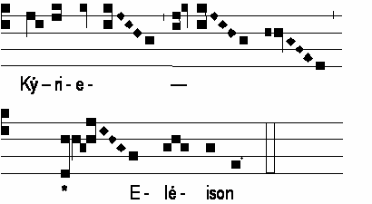 Extrait du Kyrie "Fons bonitatis": exemple de style melismatique